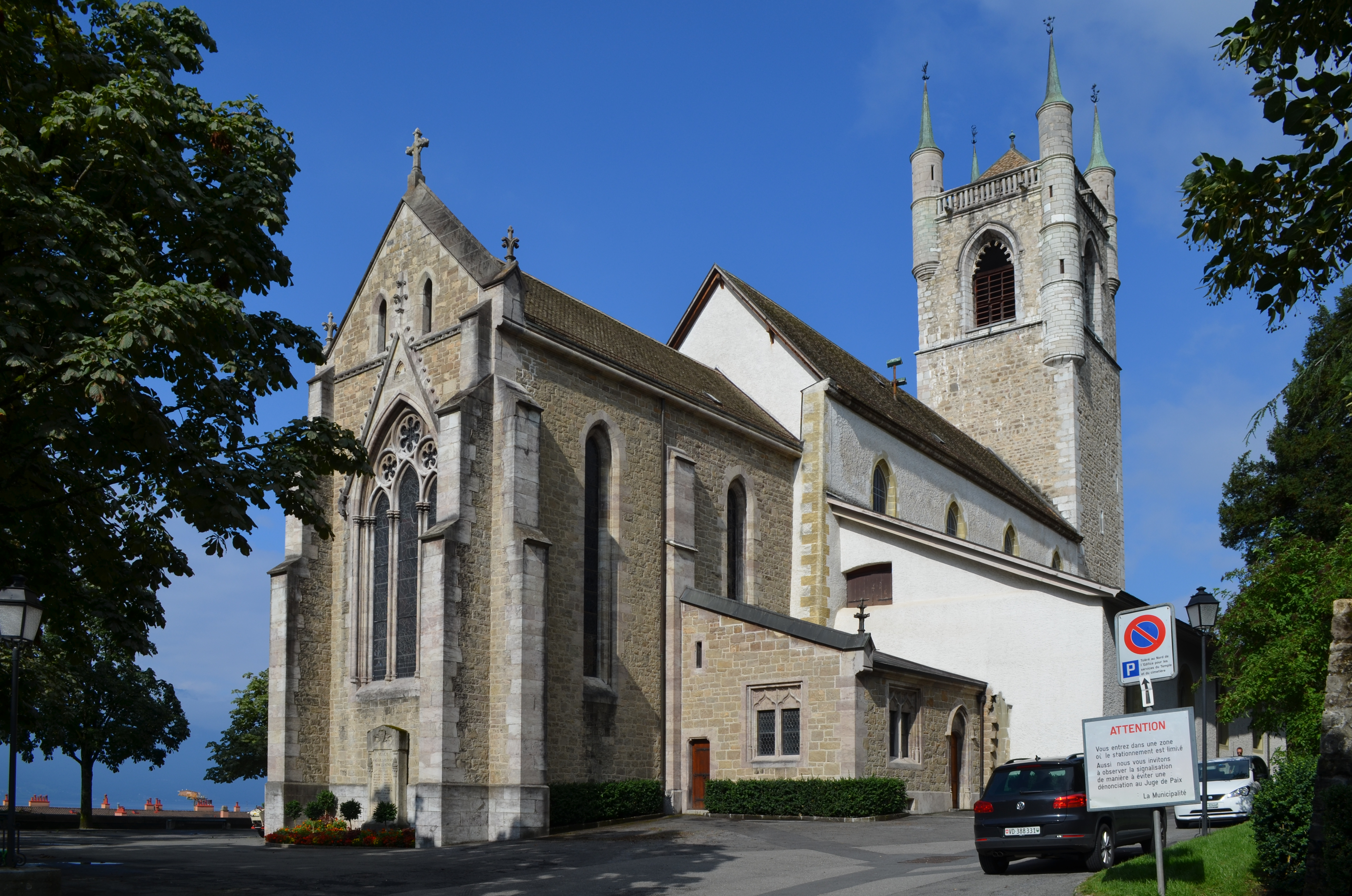 Église réformée Saint-Martin de Vevey - 01 - vue générale du nord-est